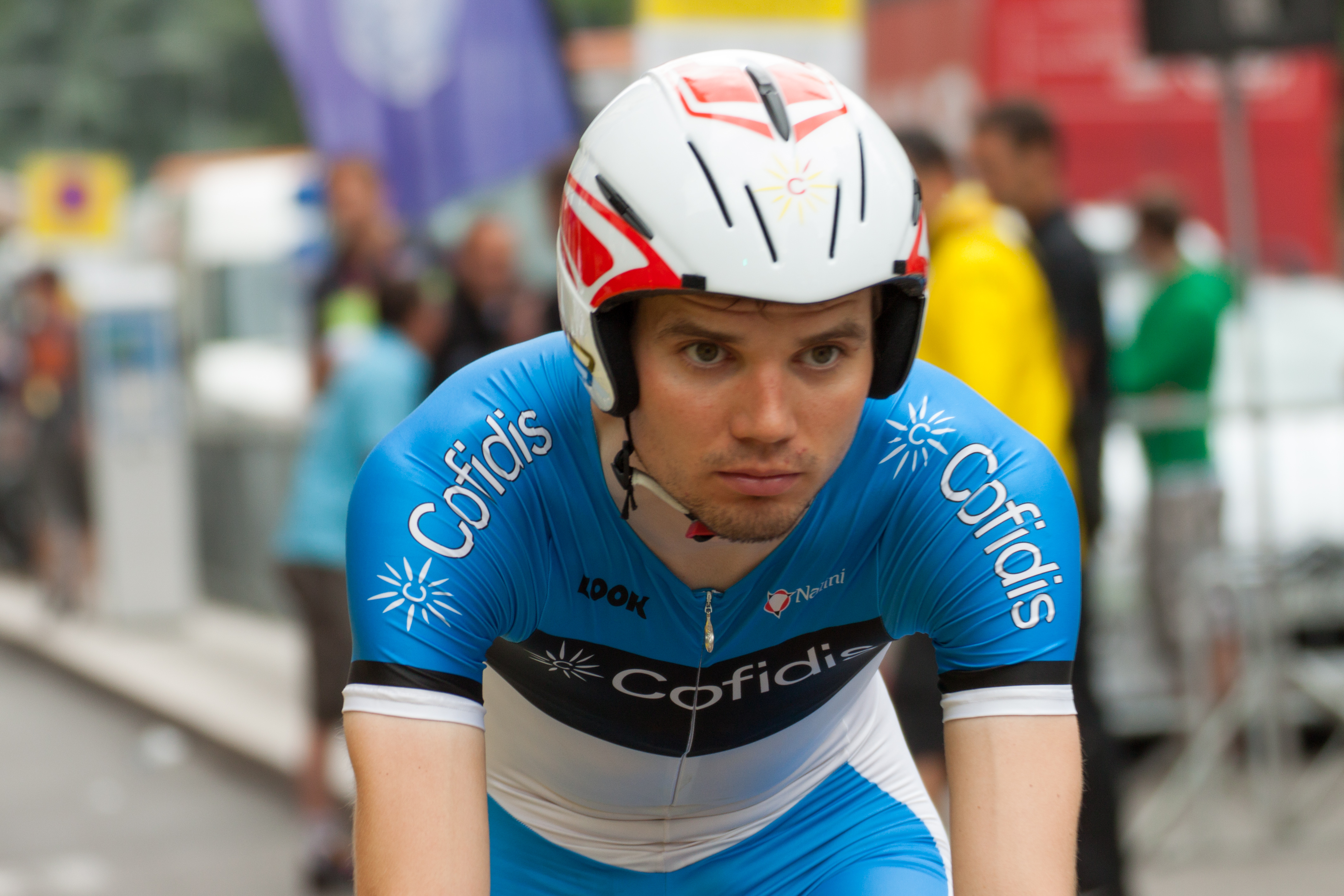 Rein Taaramäe lors du Prologue du Critérium du Dauphiné 2012